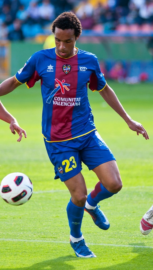 Valdo Lopes jugador granota